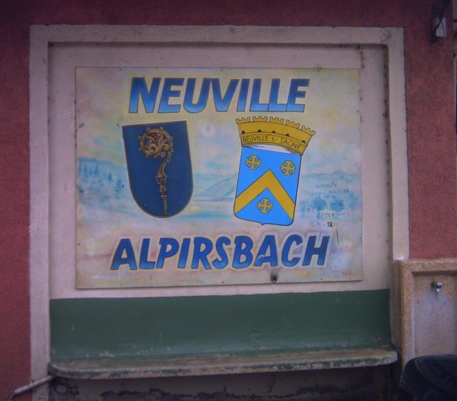 Blasons de Neuville et Alpirsbach sur le kiosque du quai